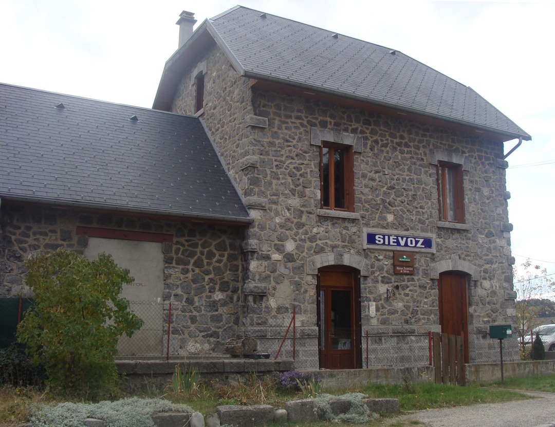 La gare de Sièvoz, sur l'ancienne ligne de la Mure à Corps (Isère); état actuel.